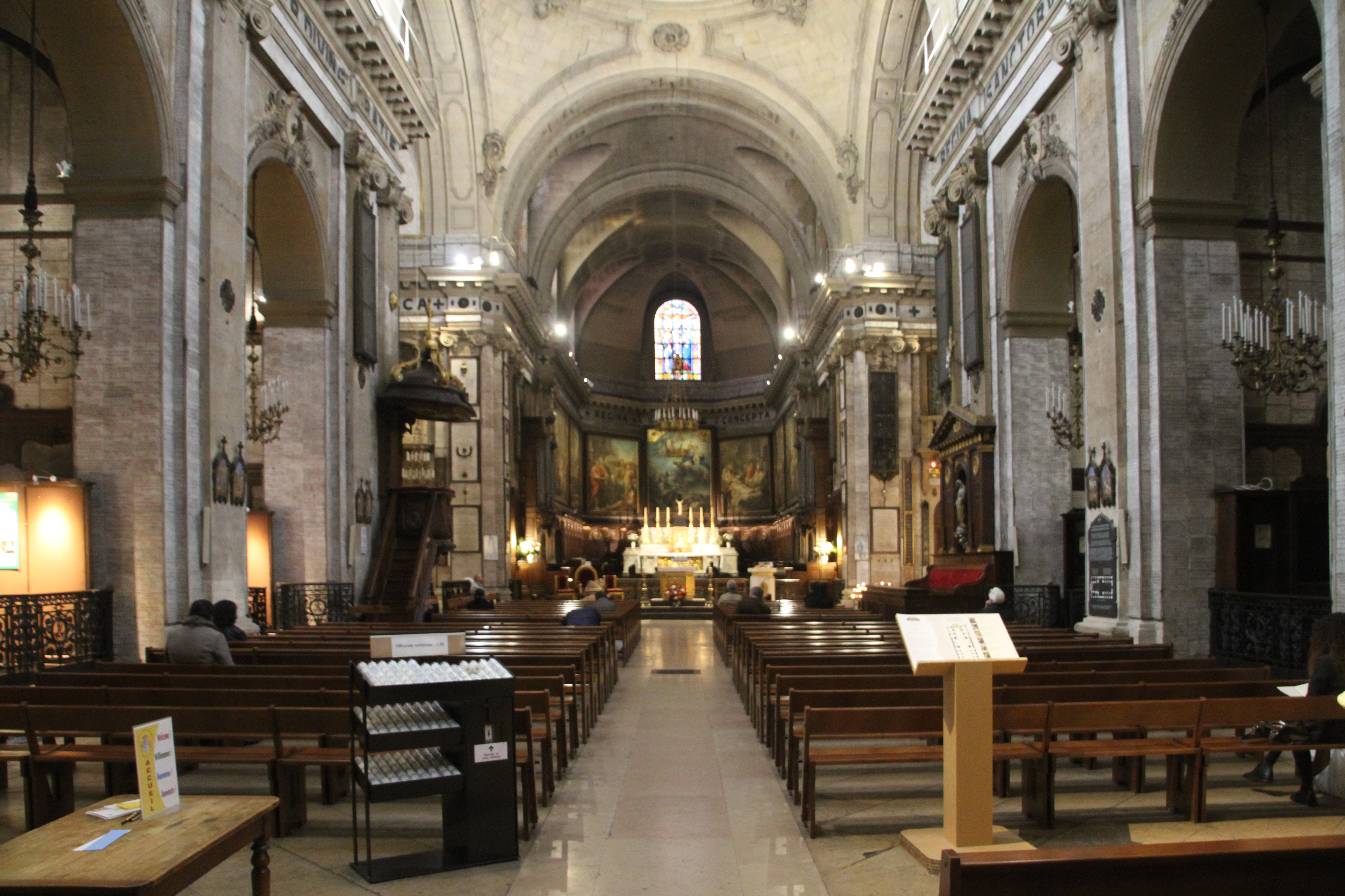 Notre-Dame-des-Victoires in Paris